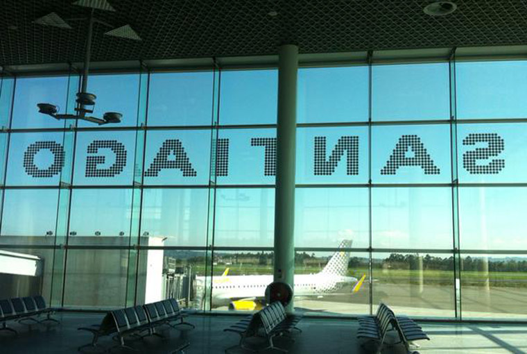 interior de la zona de embarque del aeropuerto de Santiago de Compostela